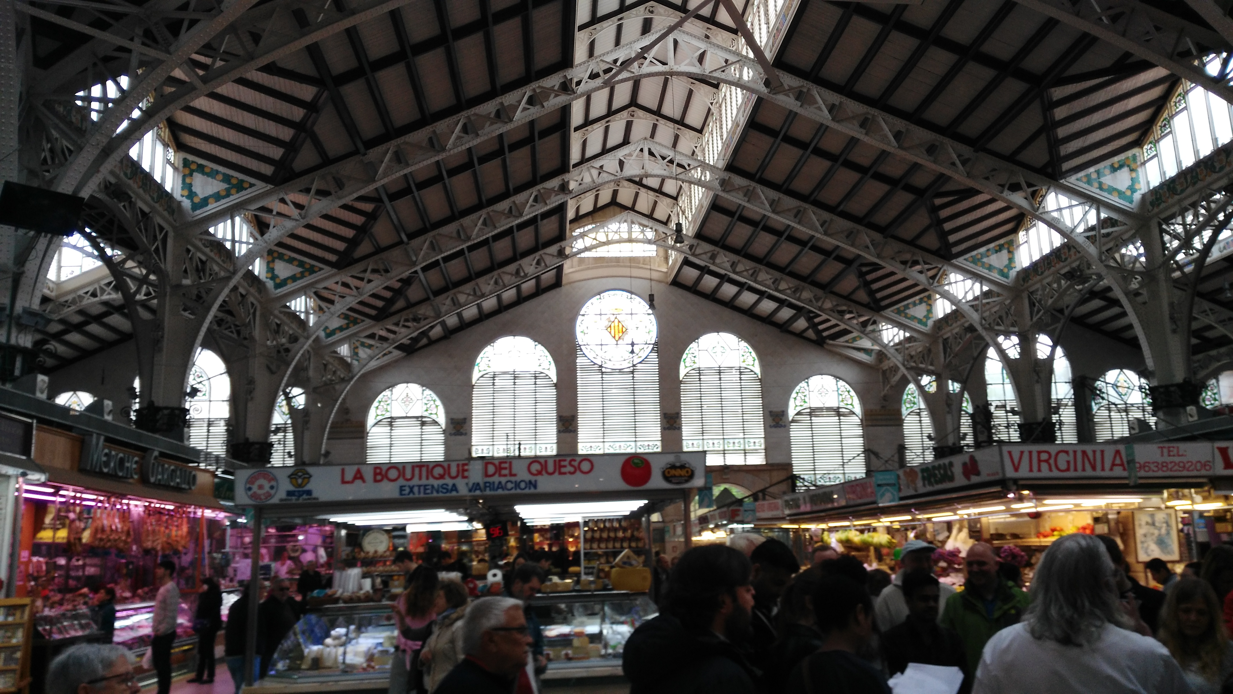 Mercato centrale di Valencia: interno